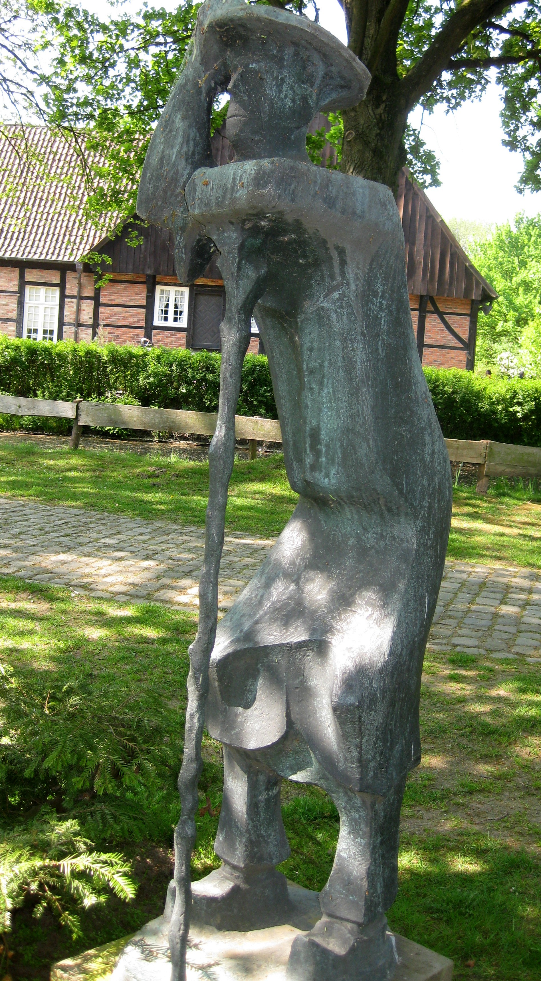 Spökenkieker, gestiftet vom Verein Niederdeutsches Münster, 1970, Dr. Ludwig Humborg, * 1890 + 1972, steht im Mühlenmuseum Münster, Bildhauer Rudolf Breilmann / Münster